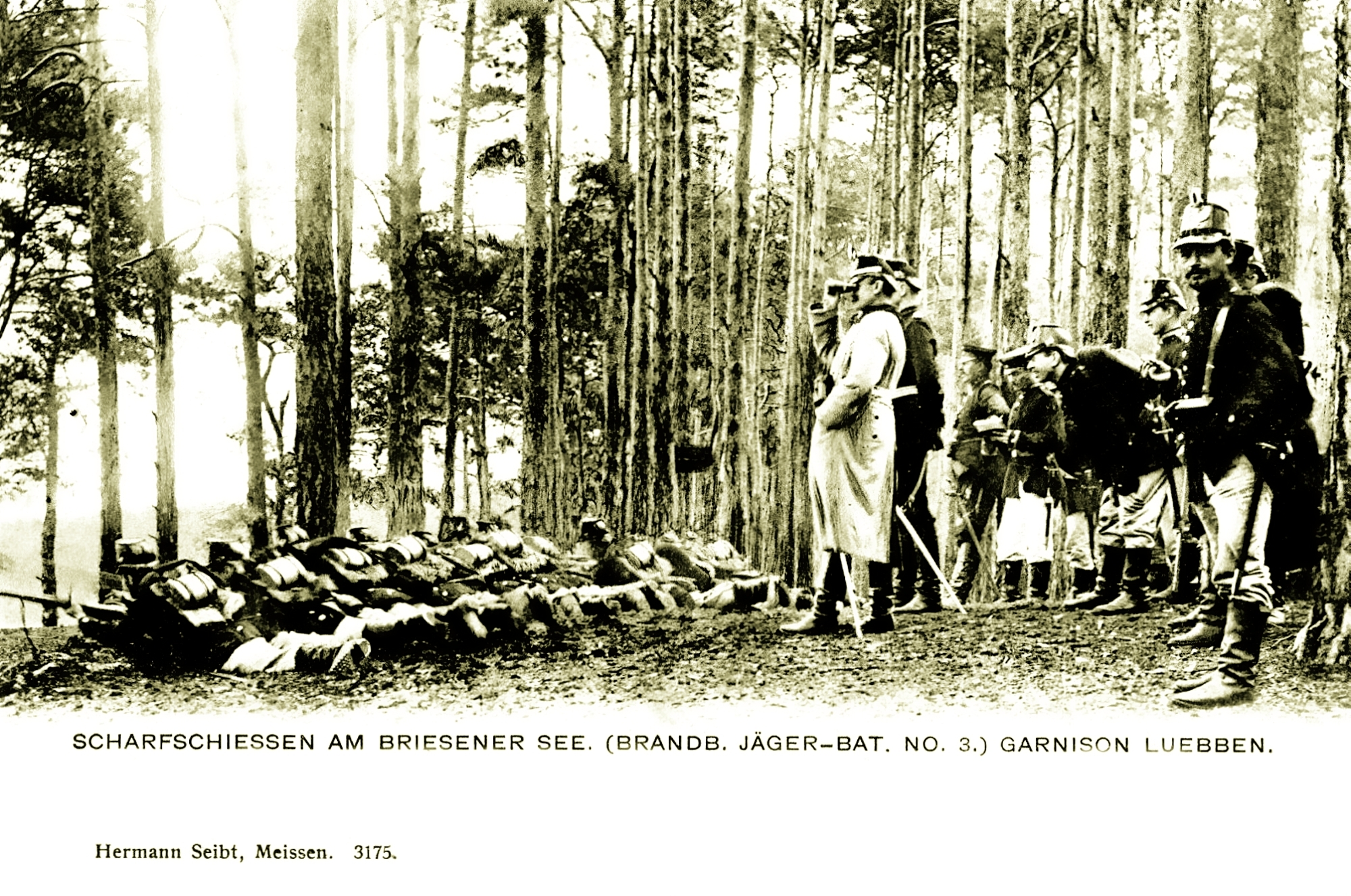 firearms shooting training